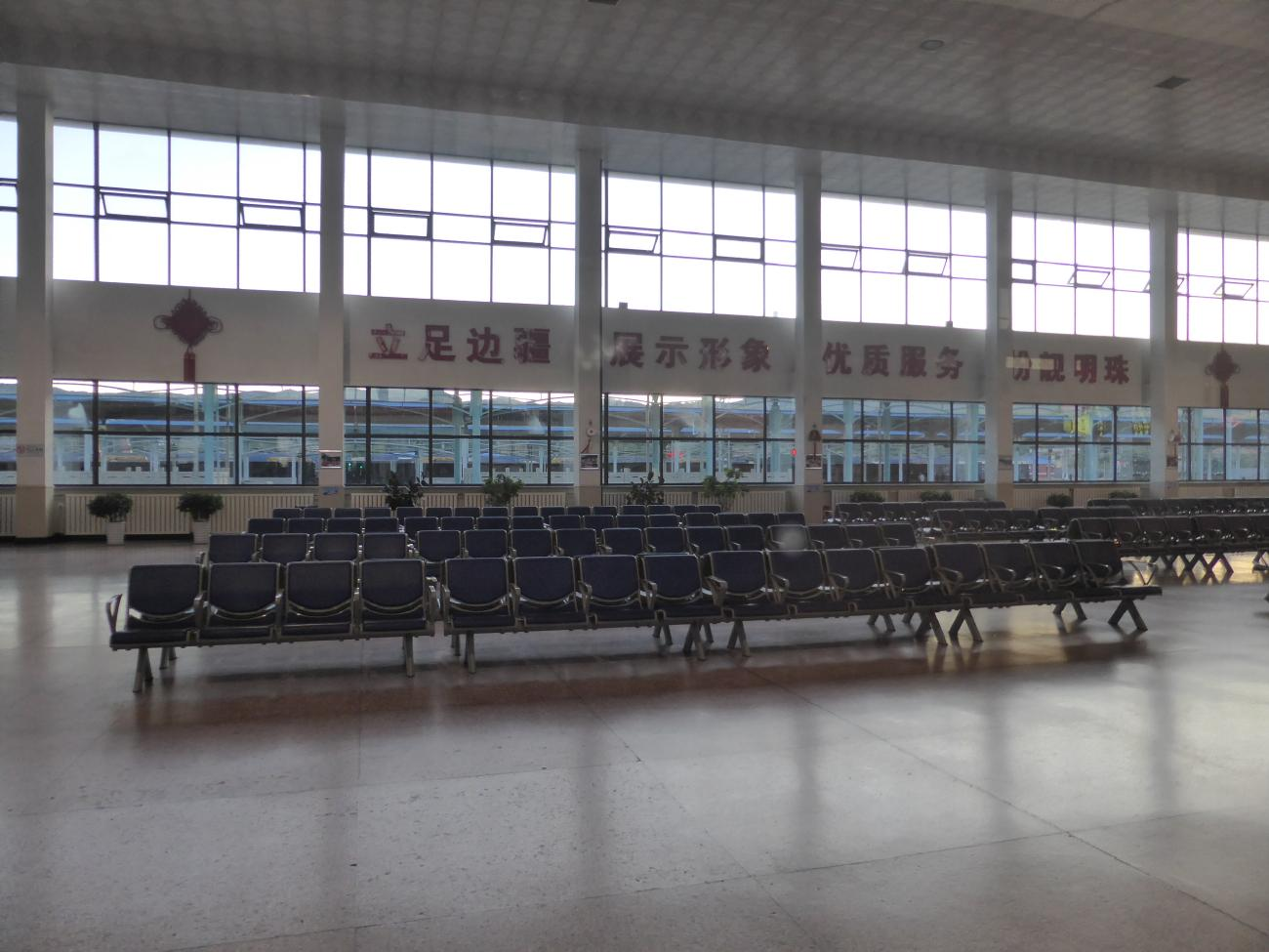 図們駅構内